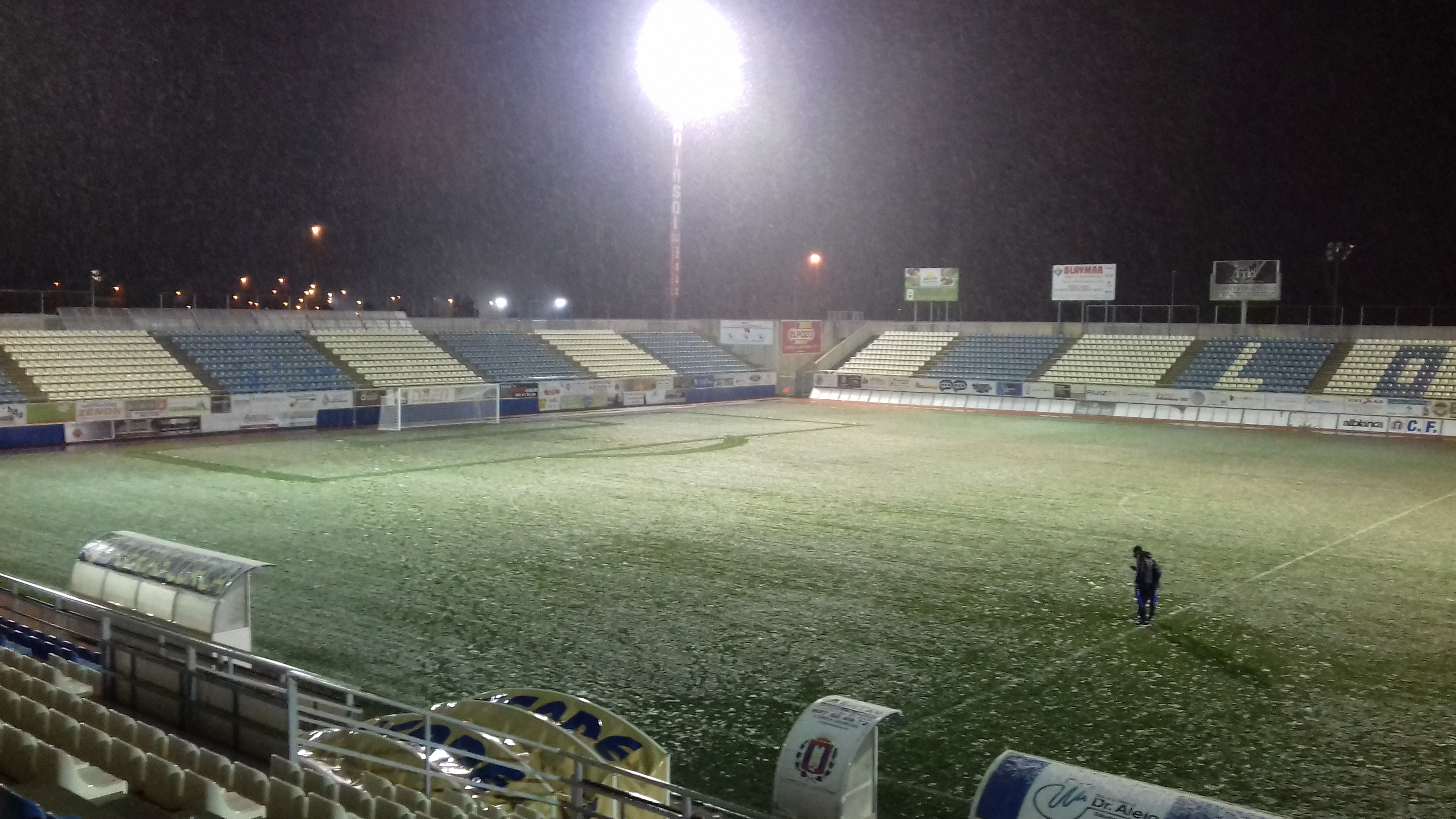 Estadio Municipal Francisco Artés Carrasco nevado el 18 de enero de 2017.